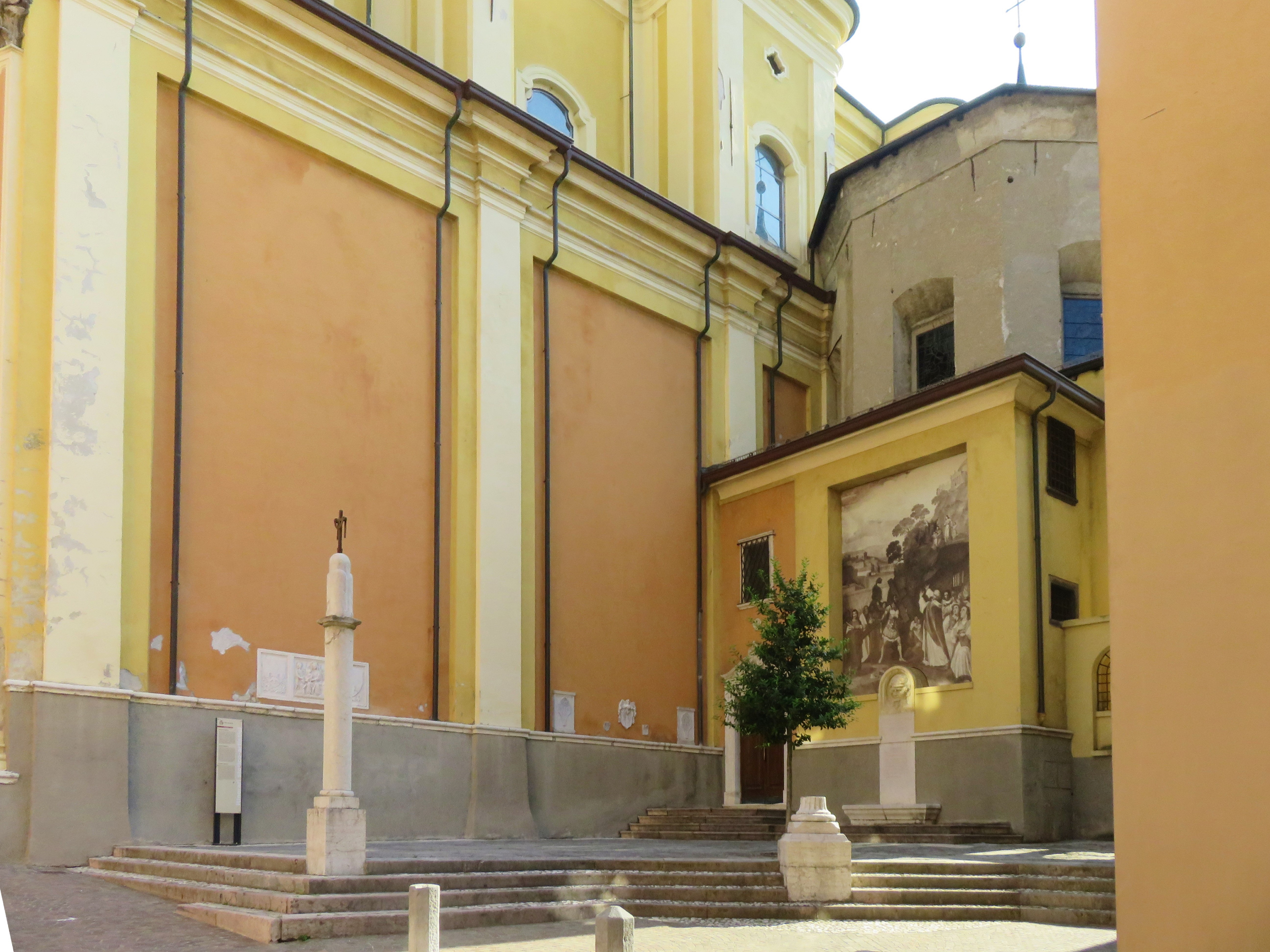 Chiesa di Santa Maria Assunta. Lato sud. Piazzetta Graffonara.